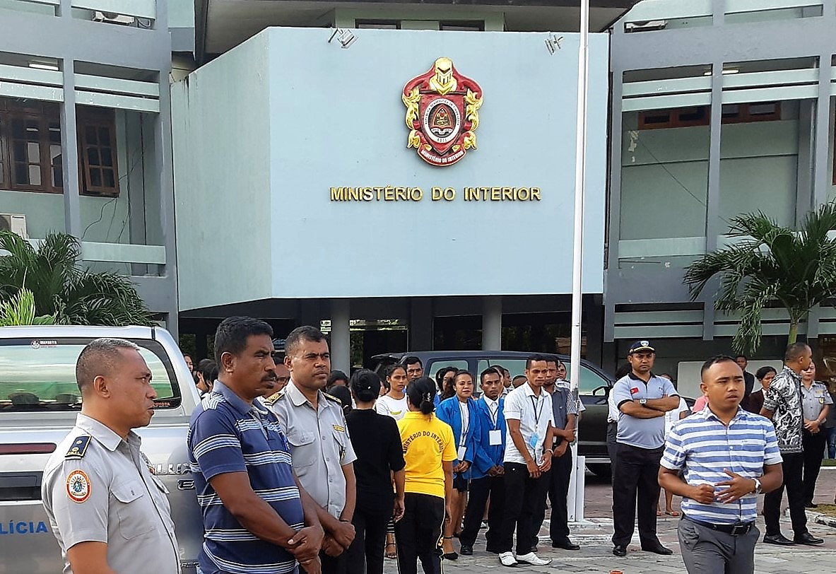 Innenministerium Osttimors